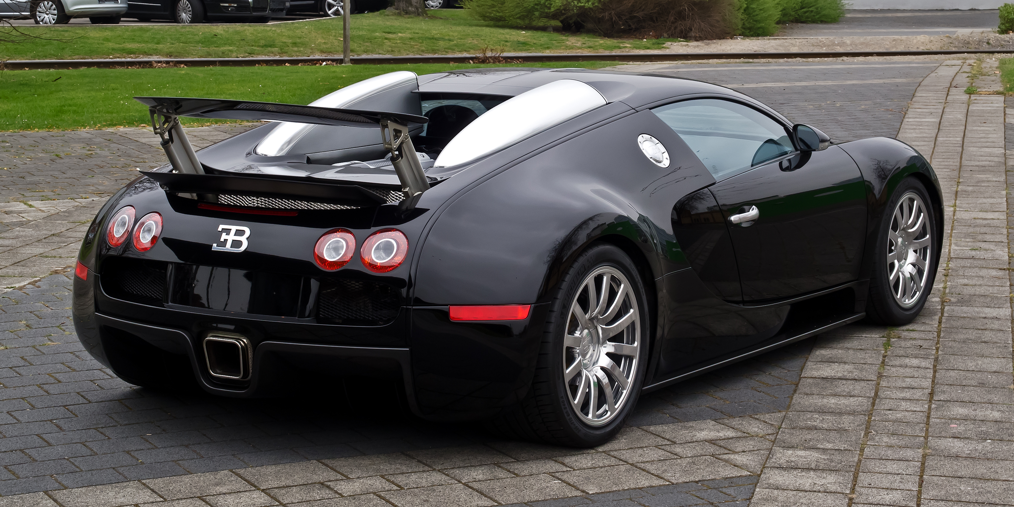 Bugatti Veyron 16.4